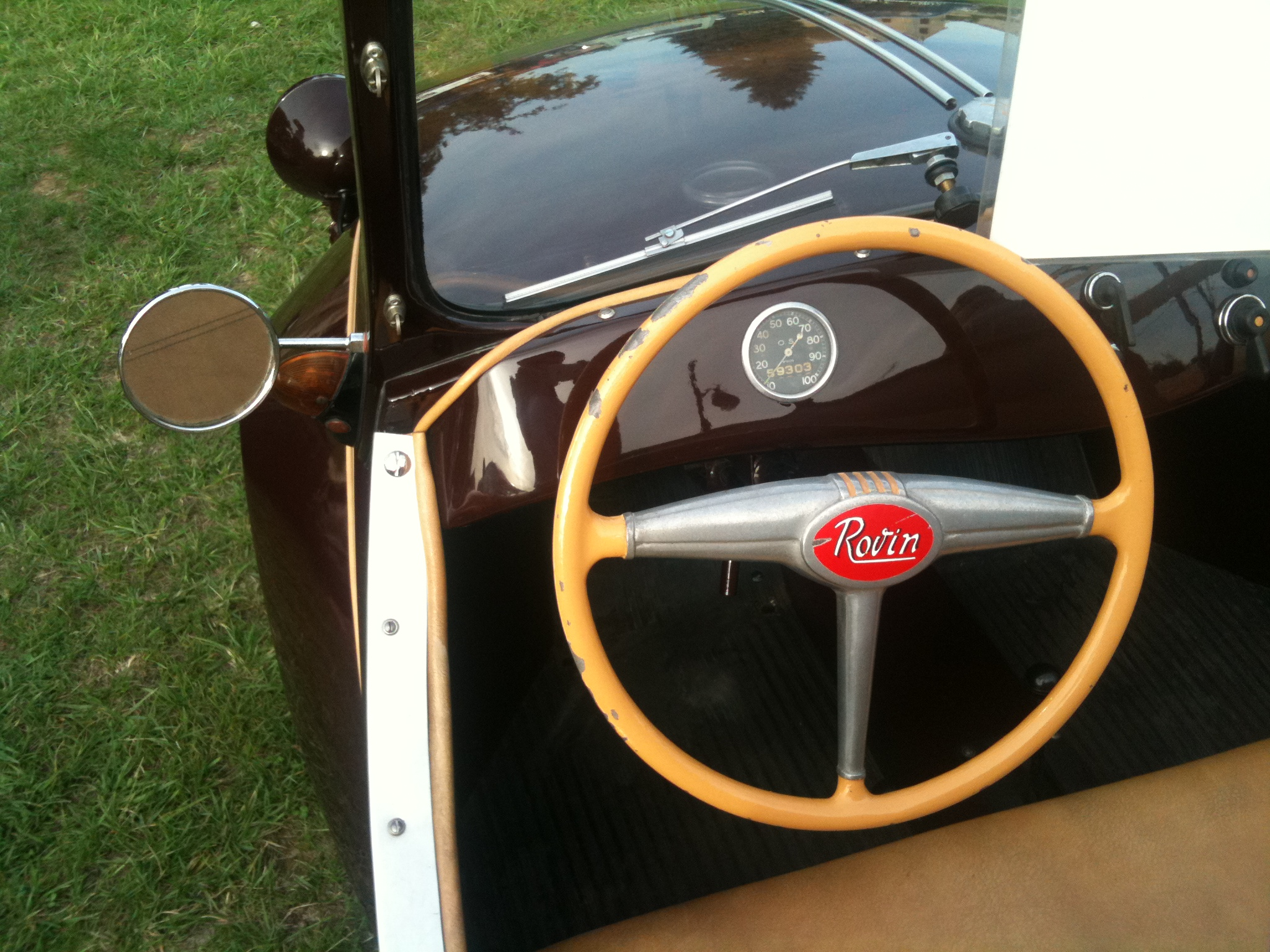 Rovin Type 2 produite en 1949 à Saint-Denis dans l'usine Delaunay-Belleville photographiée à Trilport (Seine-et-Marne, France).